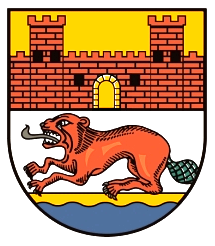 Coat of arms of Niederbieber-Segendorf in Neuwied